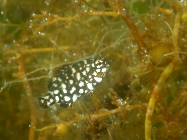 イスズミ Kyphosus vaigiensis